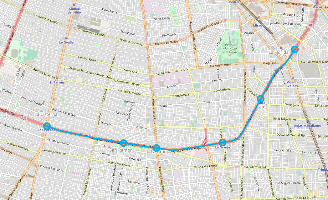 Mapa con el recorrido de la Línea 4A del Metro de Santiago